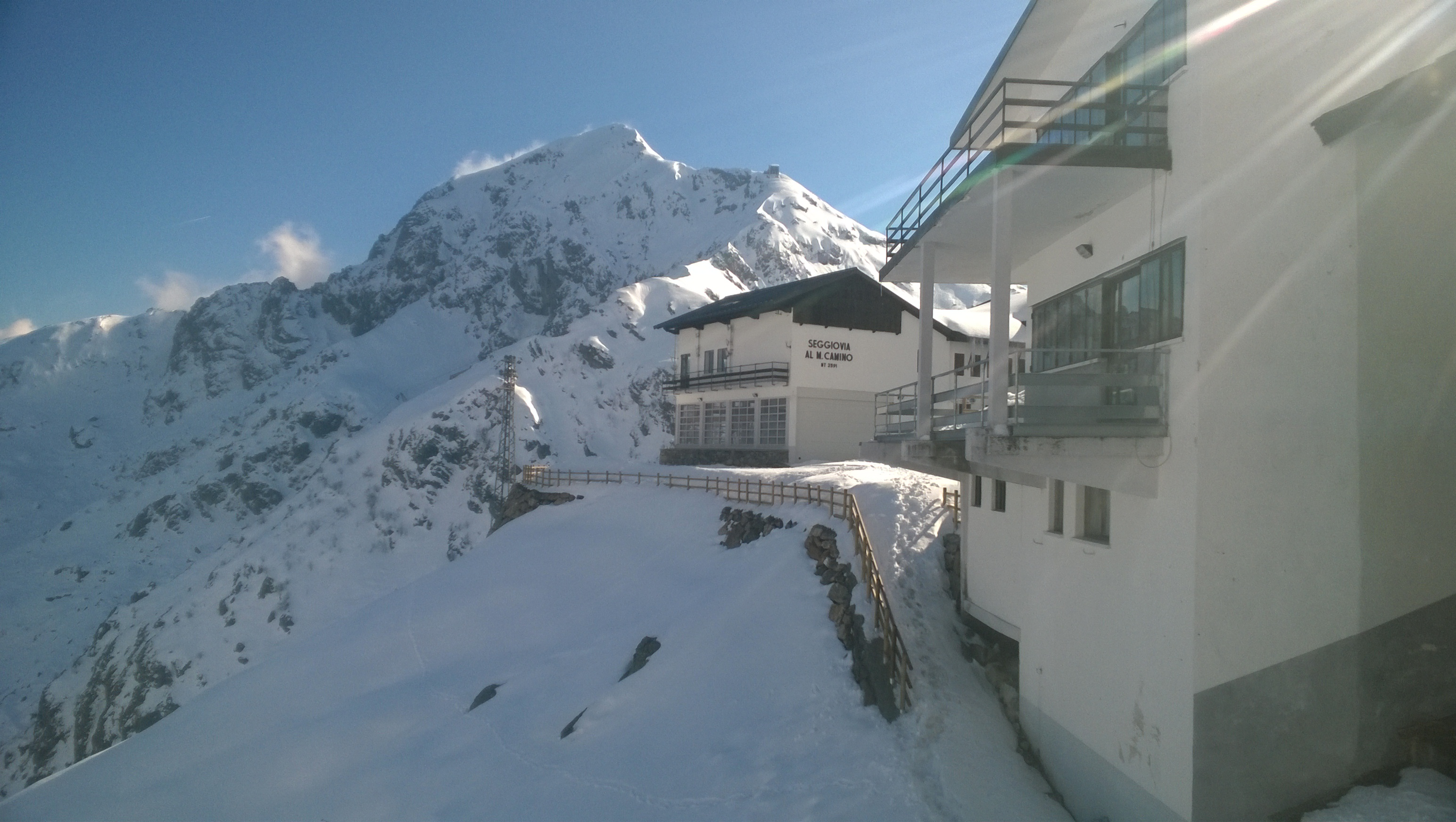 La stazione a valle della funivia lago del Mucrone-monte Camino e sullo sfondo il monte Mucrone.